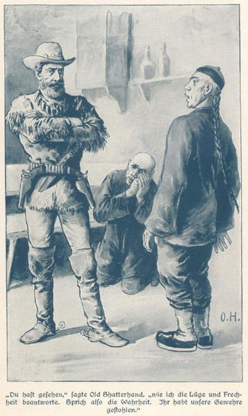 Illustration von Oskar Herrfurth zur 1899 veröffentlichten Buchausgabe der Erzählung Der schwarze Mustang (später auch Halbblut) von Karl May